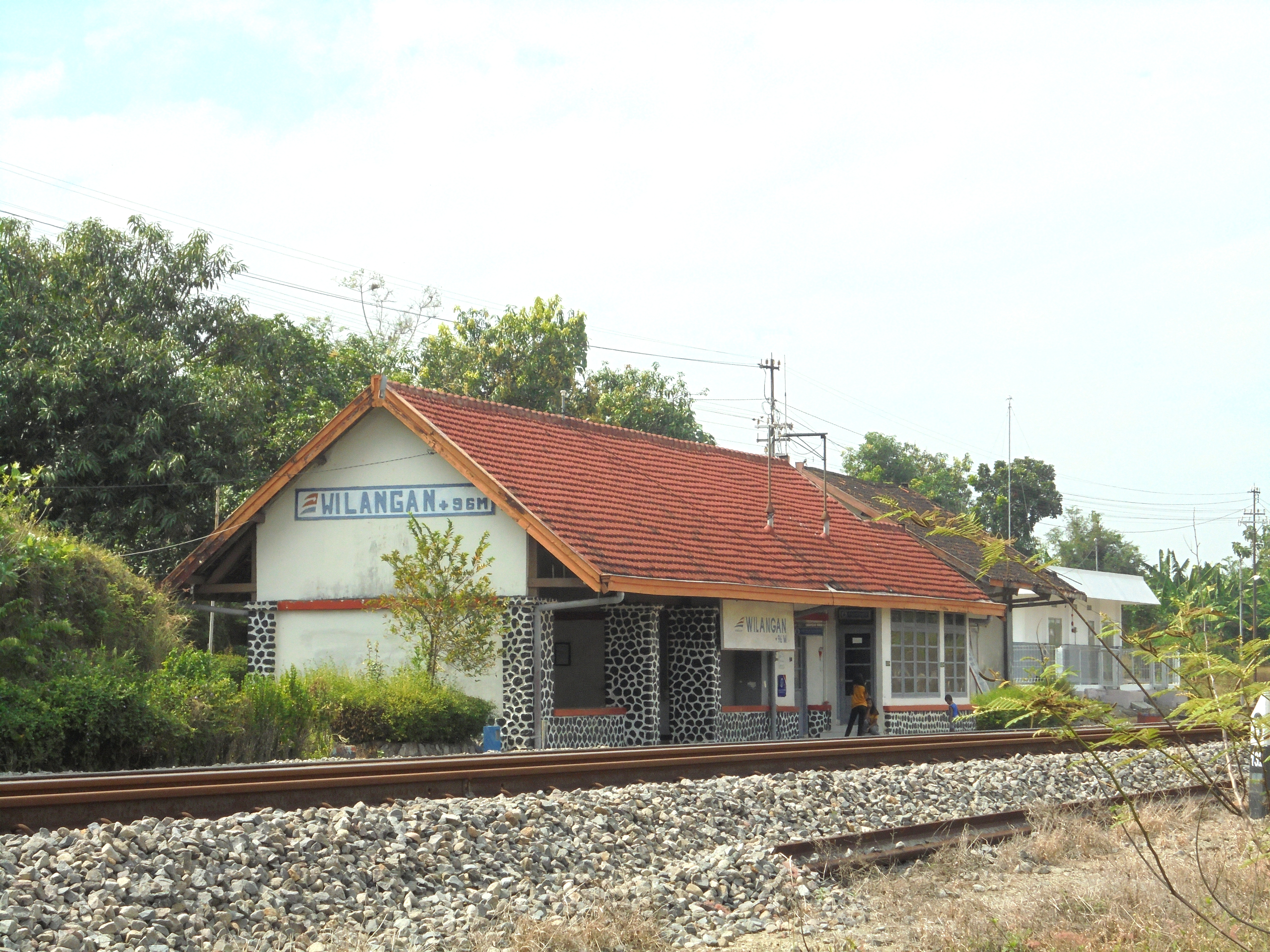 Stasiun Wilangan adalah stasiun nonaktif yang terletak paling barat di Kabupaten Nganjuk